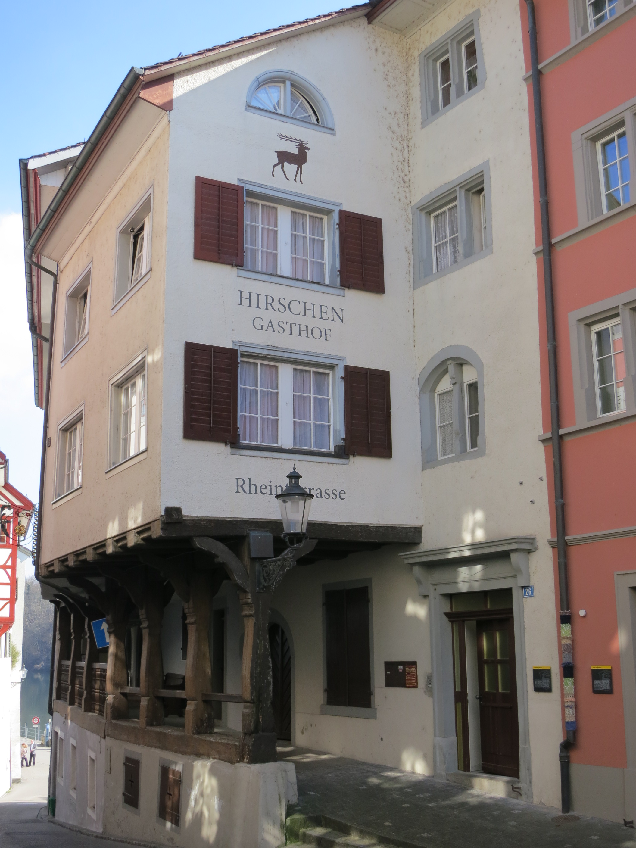 Gasthaus, Eglisau ZH, Schweiz